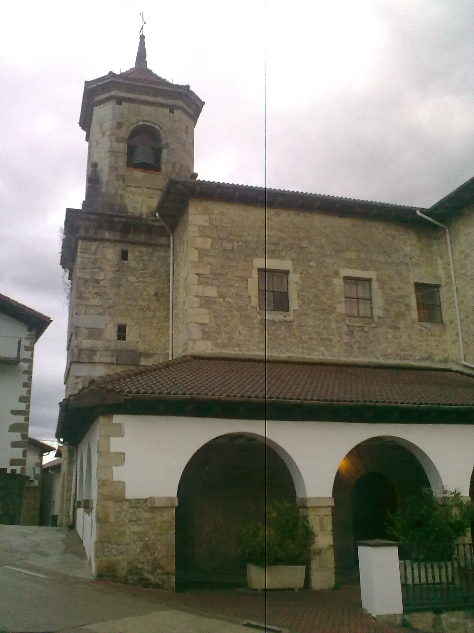 Église de Larraintzar, à Ultzama.